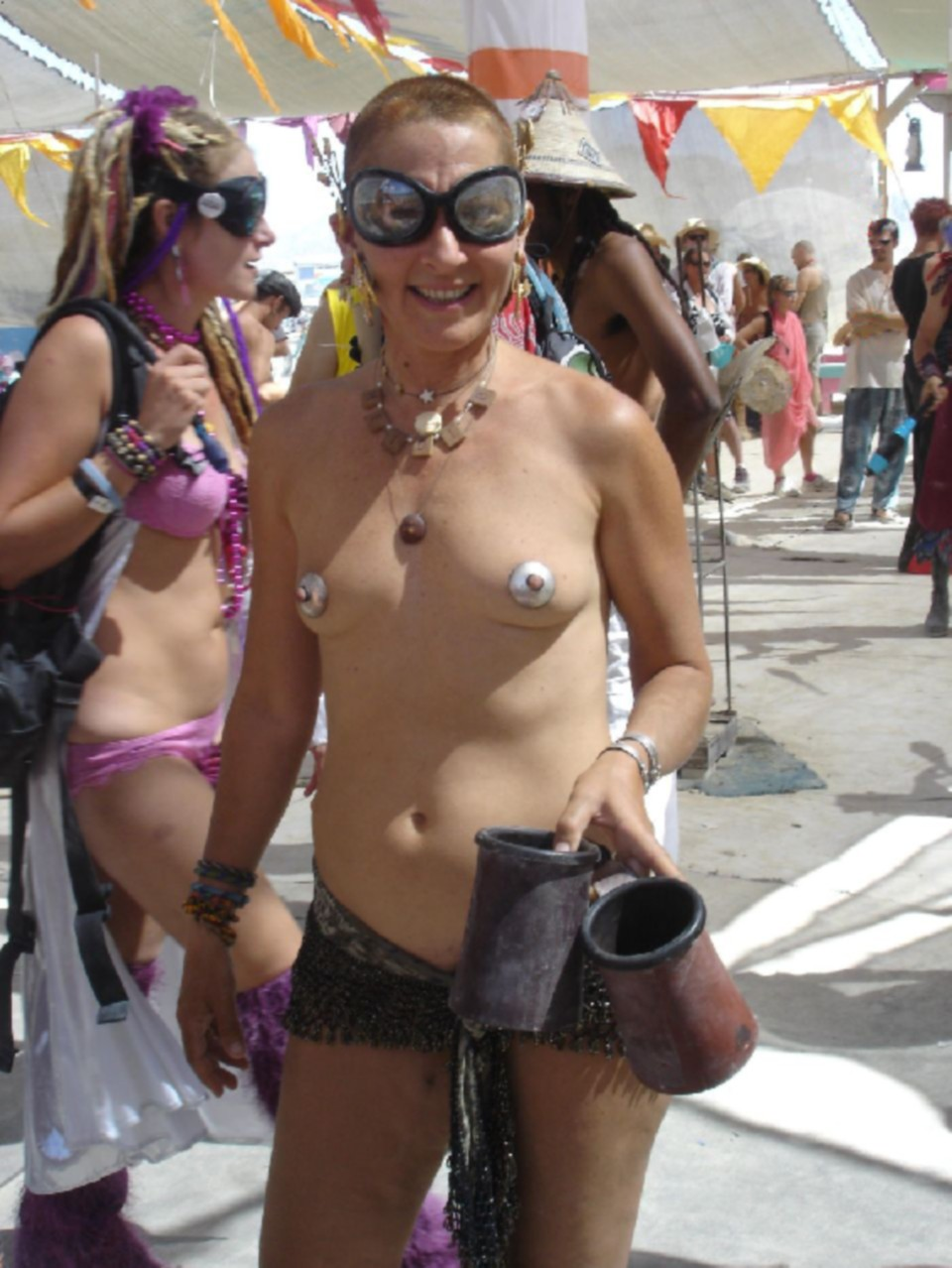 Sierra Exif JPEG